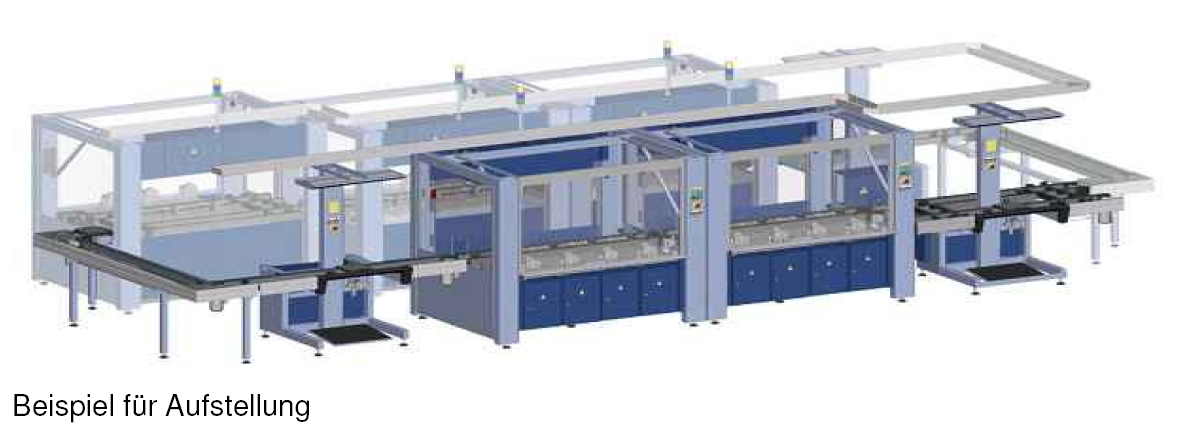 Anlage für FLAMECON-Produktion